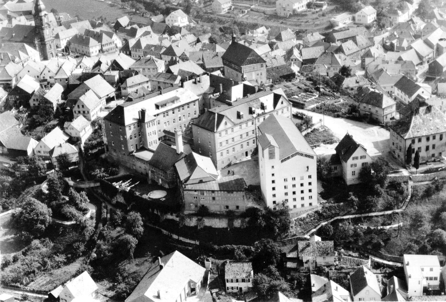 Das ehenmalige Burgareal Burgkunstadts mit dem Regens-Wagner Komplex und der neuerbauten Heimkirche. Links neben der Kirche sind die Reste der Stadtmauer zu erkennen.